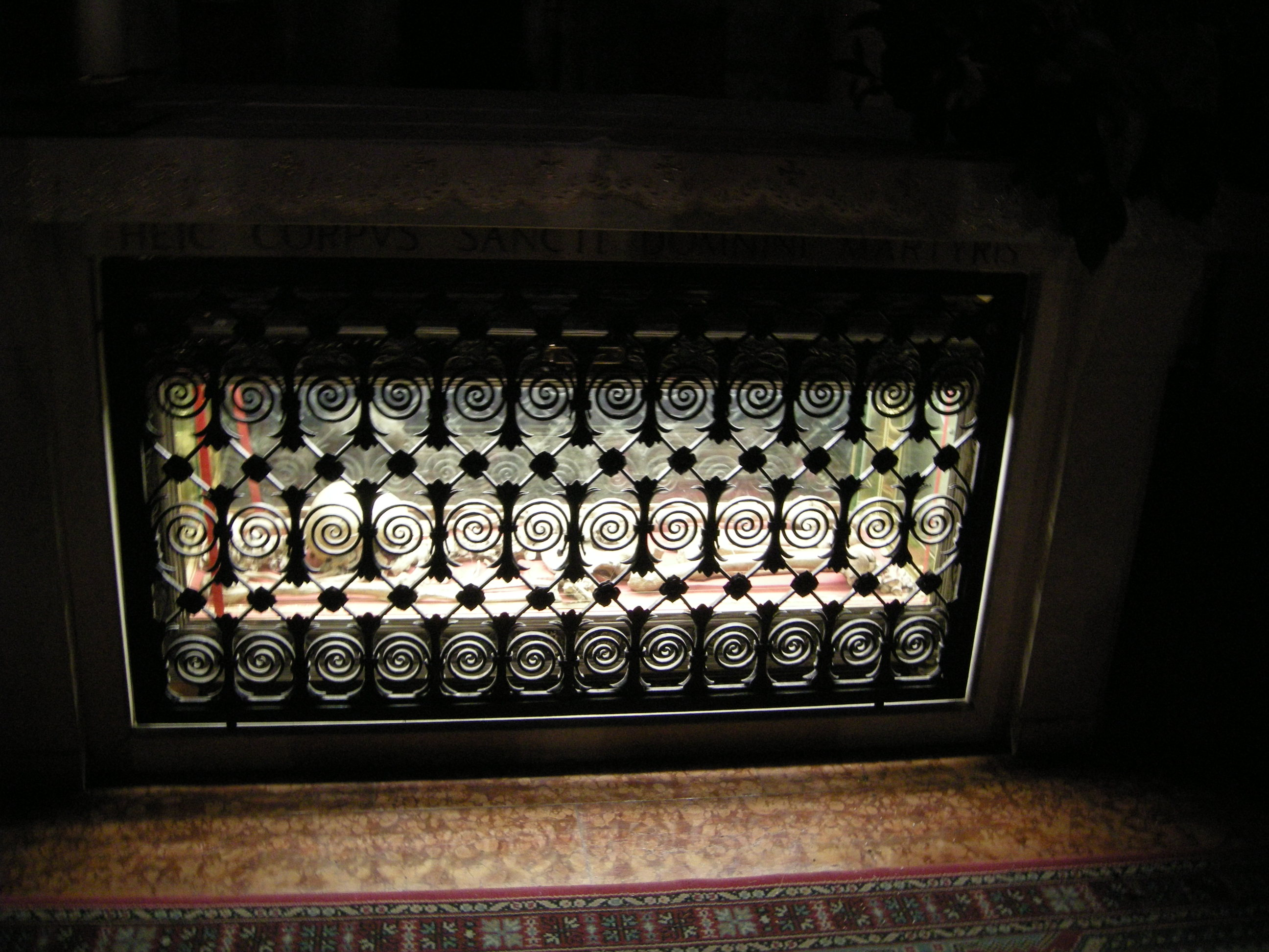 Duomo di fidenza, interno, cripta 03 spoglie di san donnino